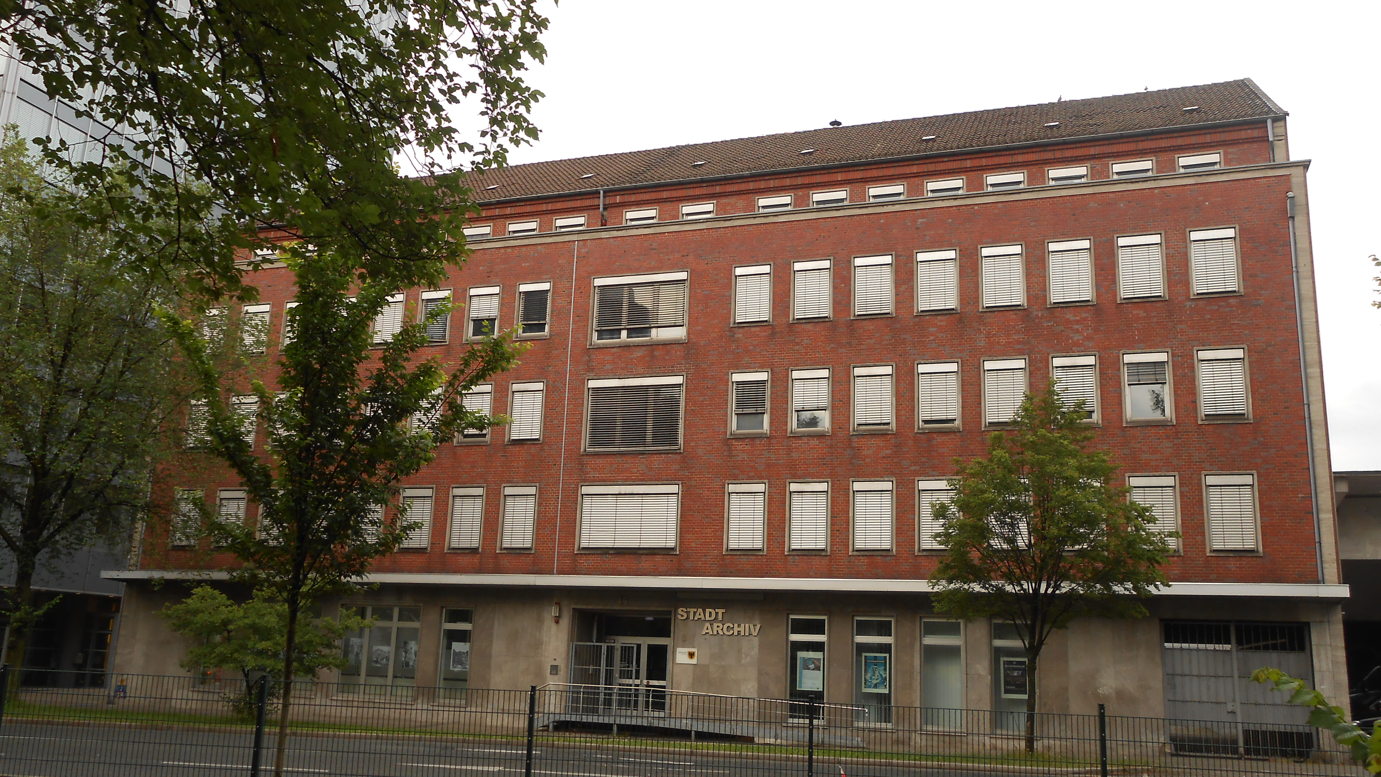 Das Stadtarchiv Dortmund an der Märkischen Straße, gegenüber dem S- und U-Bahnhof Stadthaus.